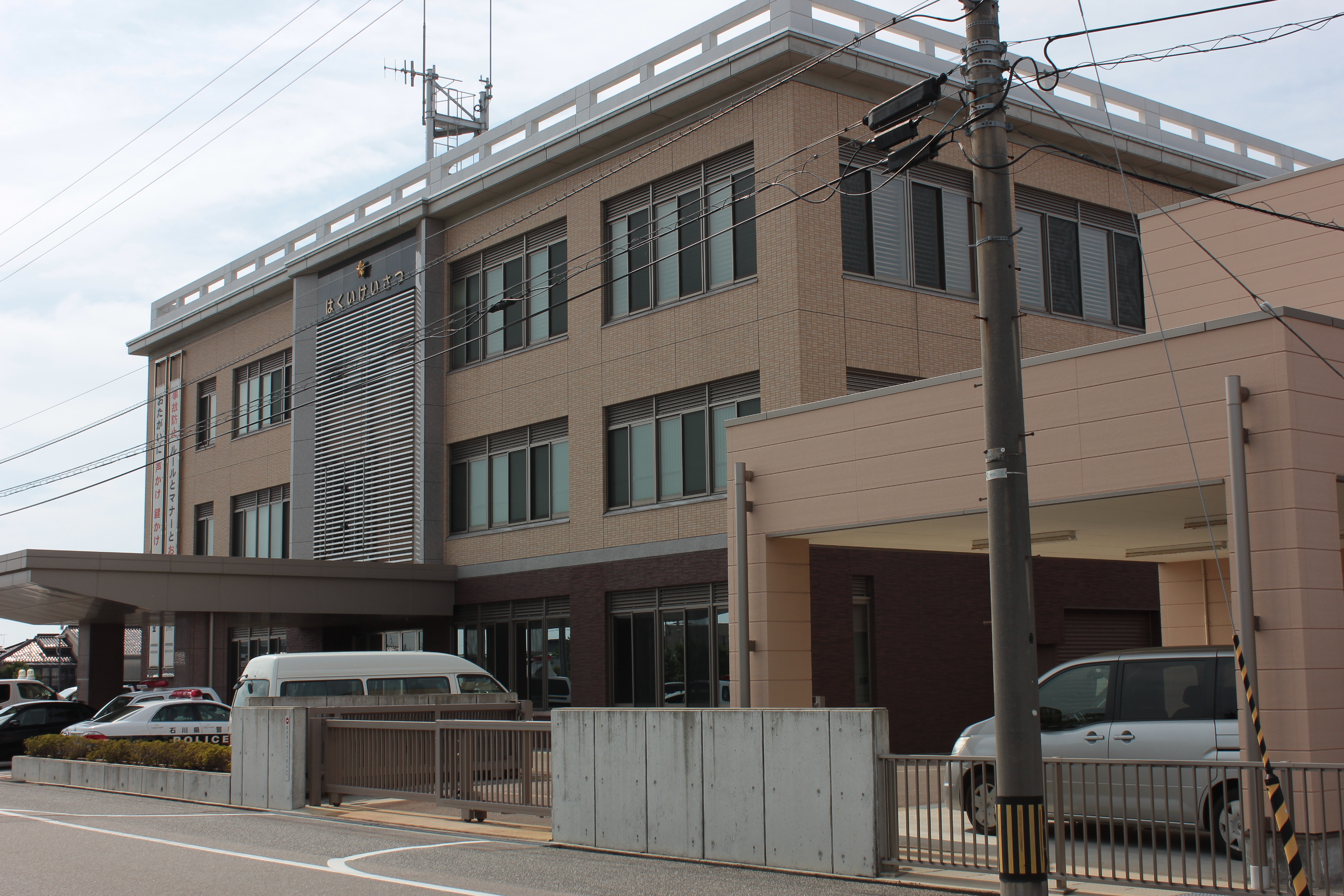 羽咋警察署（石川県羽咋市） Canon EOS Kiss X5